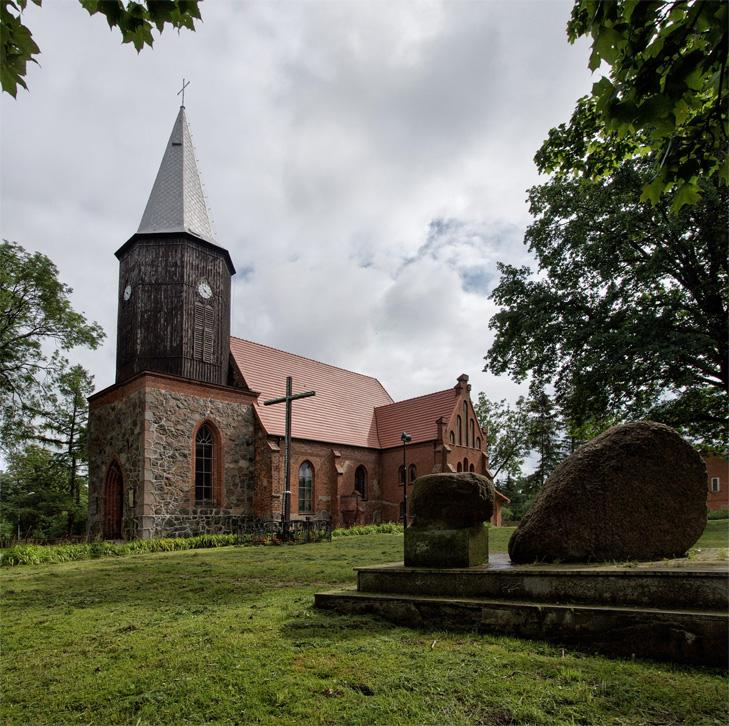 Sarbia, ul. Jana Pawła II 7 - dawny kościół ewangelicki, obecnie rzymskokatolicki parafialny pw. św. Jana Chrzciciela z XVI wieku, przebudowany w 1885 roku, cmentarz kościelny